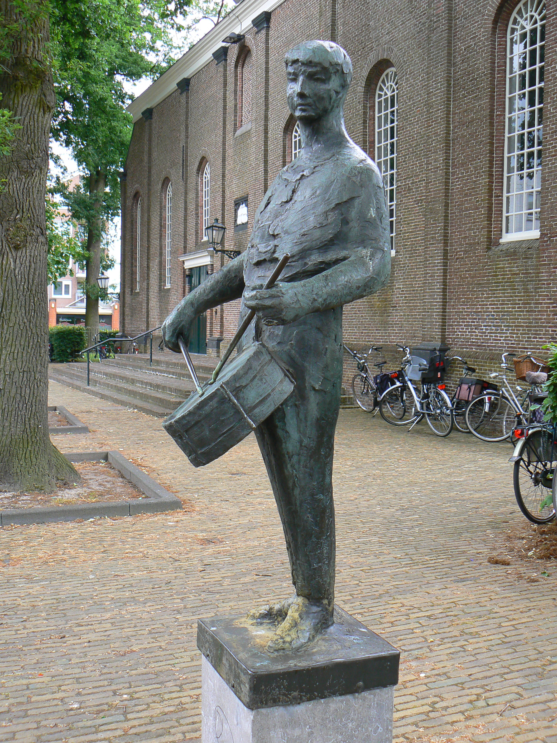 Sculpture De Trommelslager (1971) by Johan Sterenberg in Hoogeveen/The Netherlands